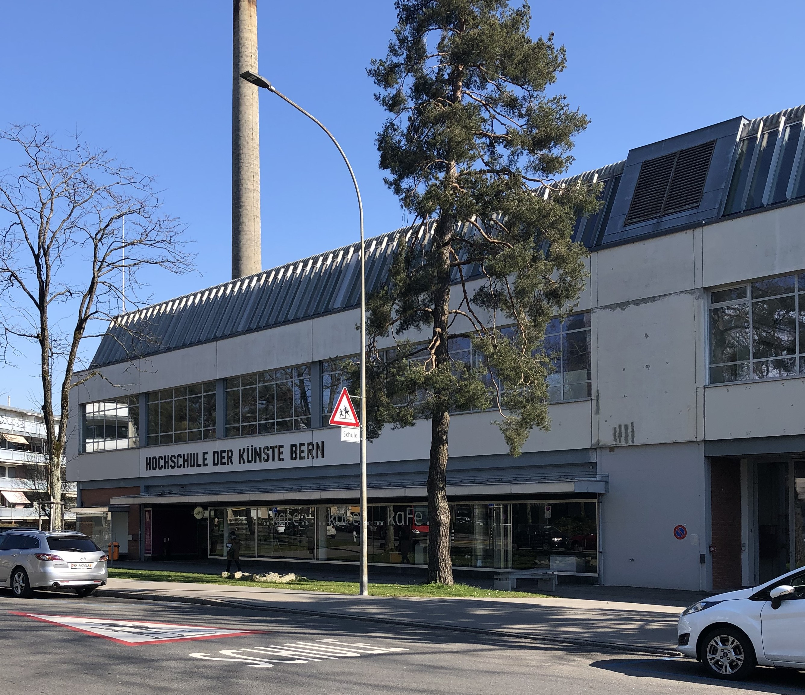 Hochschule der Künste Bern